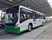 Camion Optibus haciendo escala en una terminal